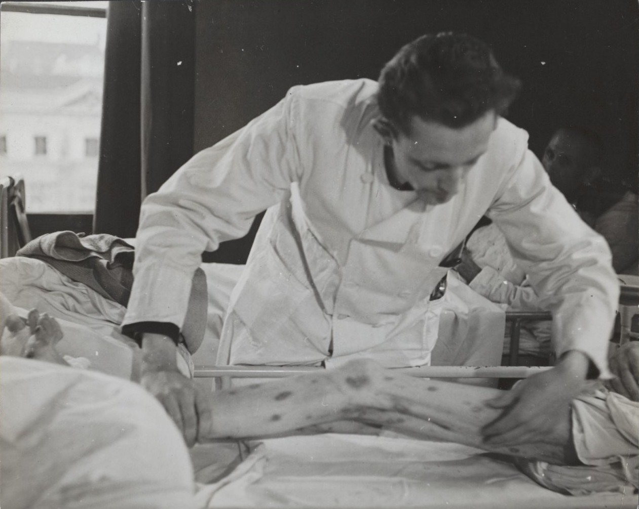 Verpleging van lijders aan hongeroedeem in het Binnengasthuis te Amsterdam. Onder leiding van de doktoren Scherpenhuysen en Haverkamp wordt al het mogelijke gedaan om deze mensen weer spoedig op de been te helpen. Locatie: Gelderland, Harskamp